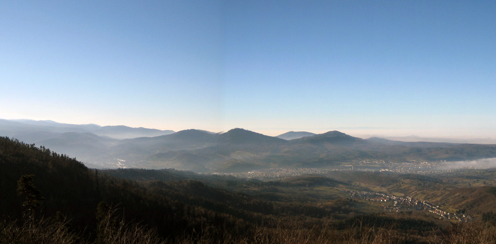 Panorama vom Bernsteinfels auf das Murgtal und den Nordschwarzwald